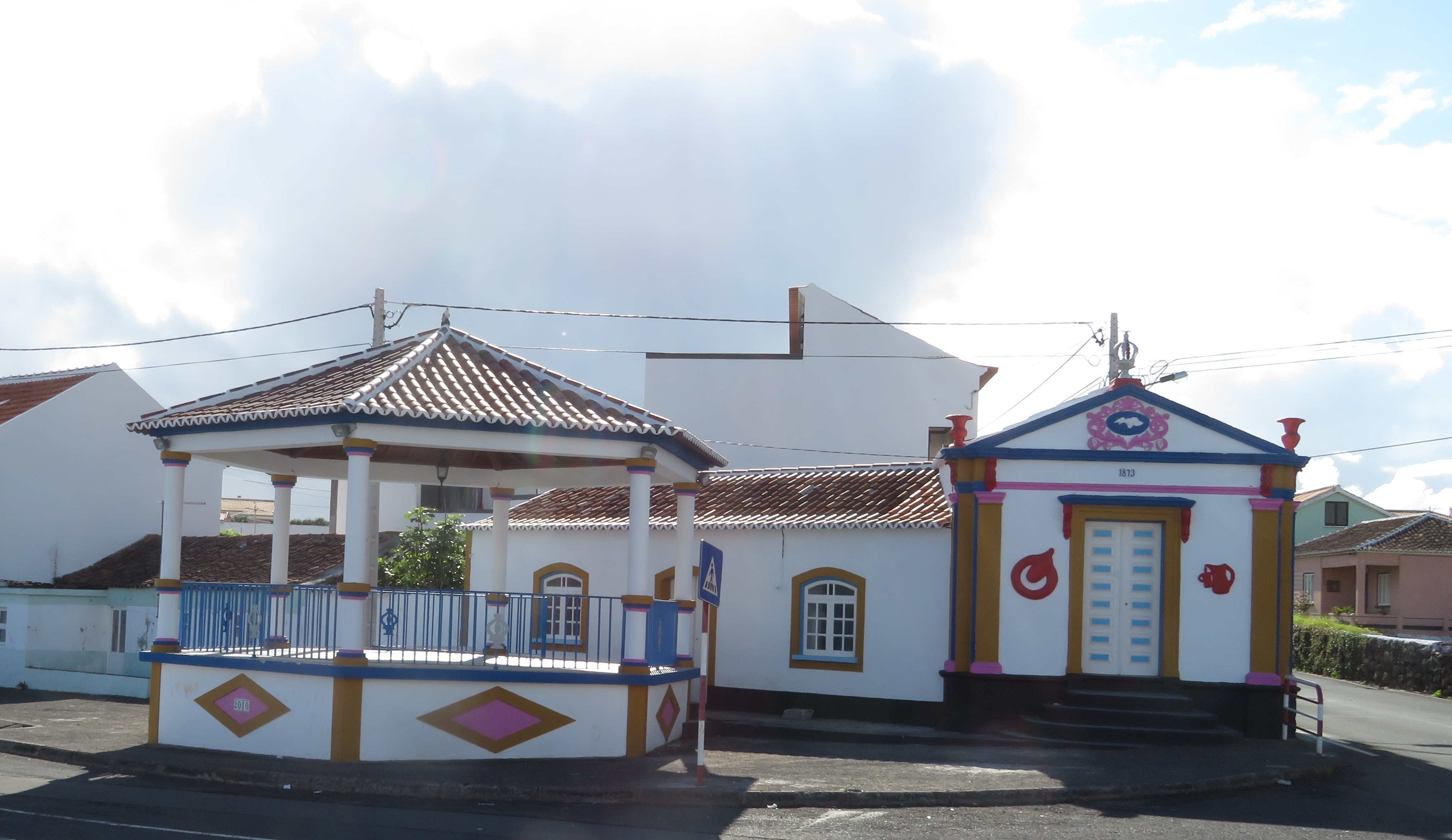 Império do Espírito Santo de São Mateus da Calheta, Ilha Terceira, Portugal